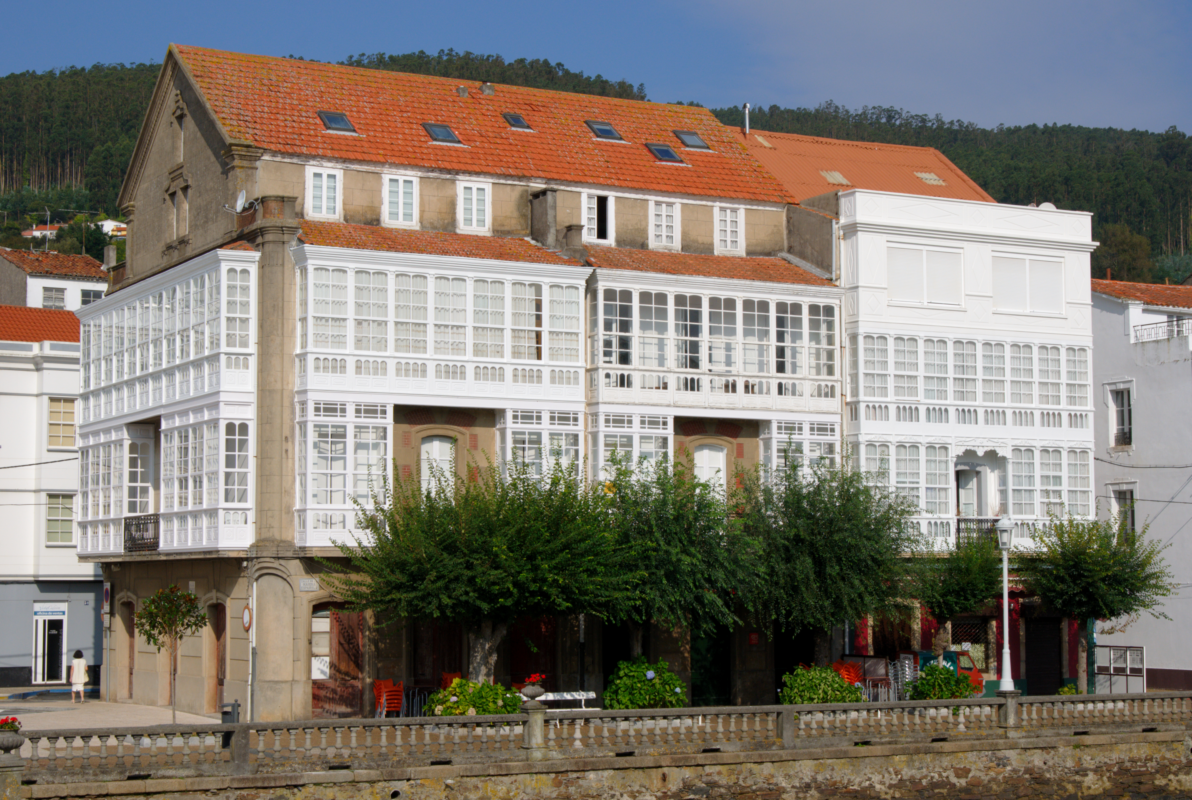 Haus im galicischen Stil mit verglasten Veranden, Cedeira, Galicien, Spanien.